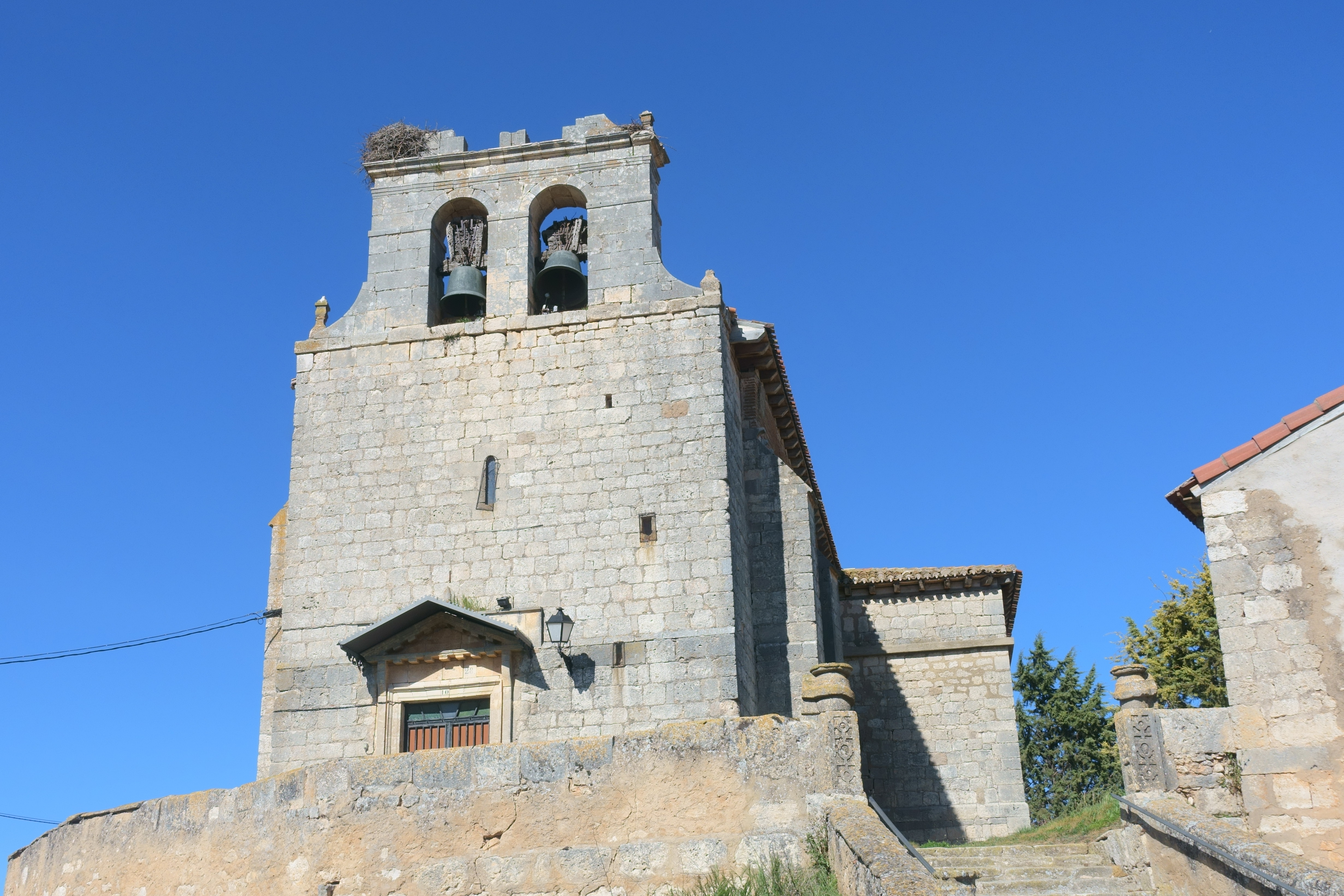 Iglesia de San Cosme y San Damián, Villangómez (Burgos, España).